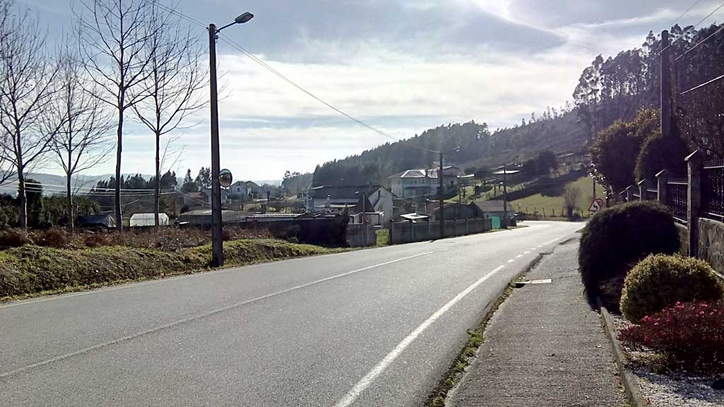 Vista de Prados, Narón.